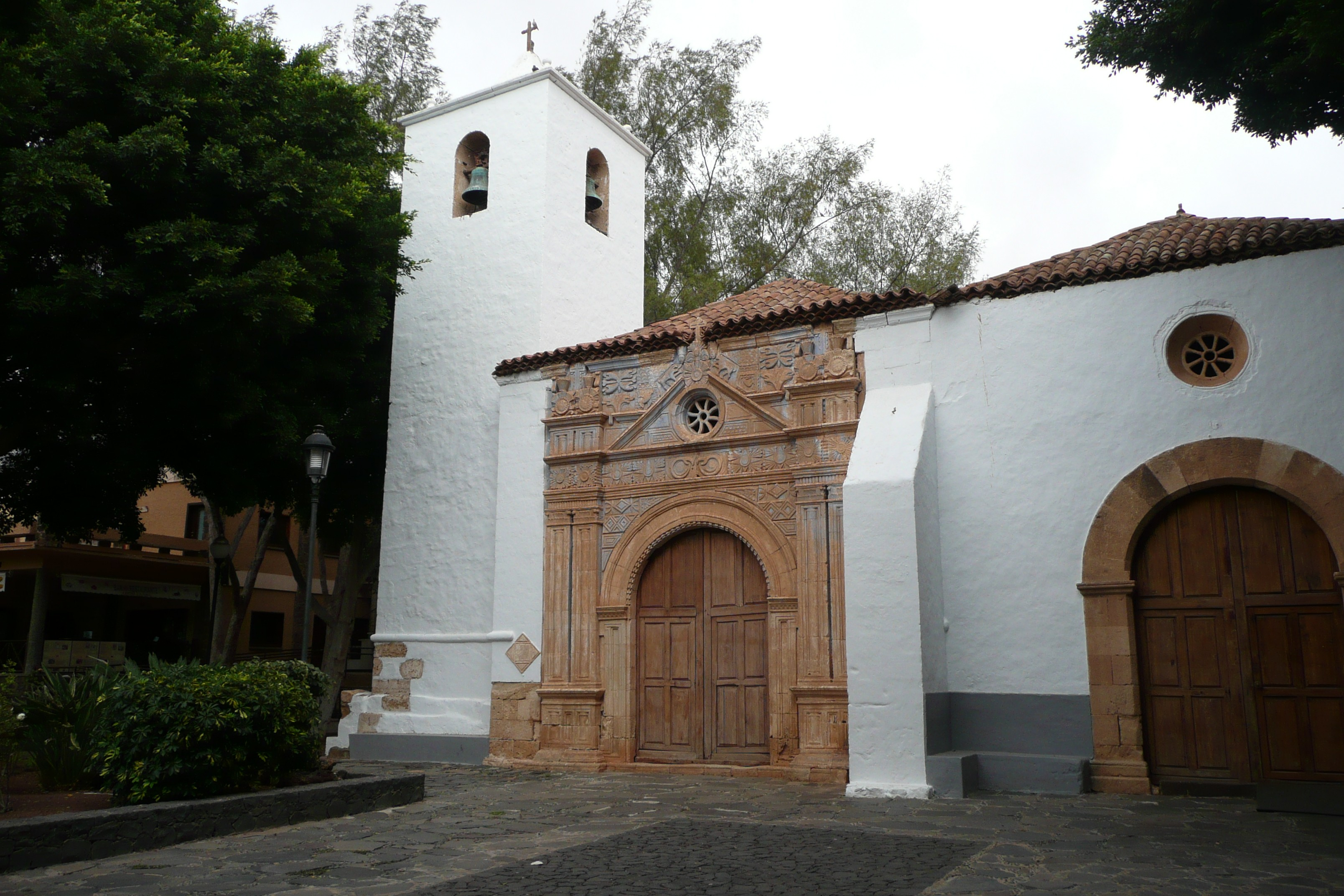 Nuestra Señora de Regla (Pajara, Fuerteventura, Spanien)